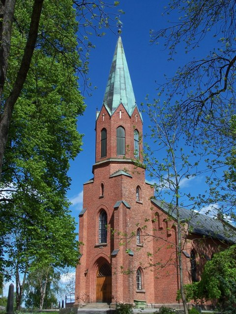 Ås kirke i Ås kommune, Akershus, Norway.